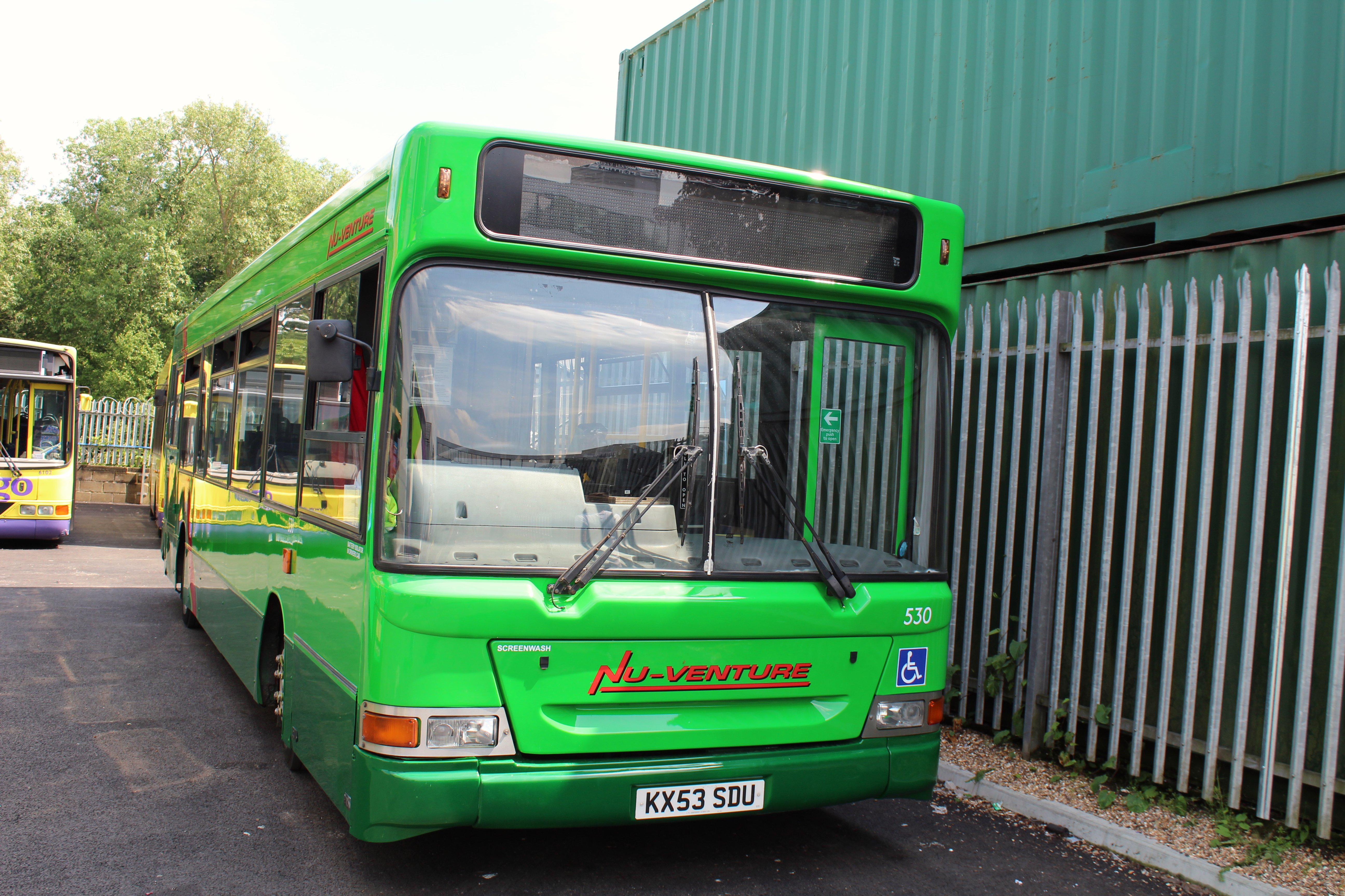 KX53SDU Otford